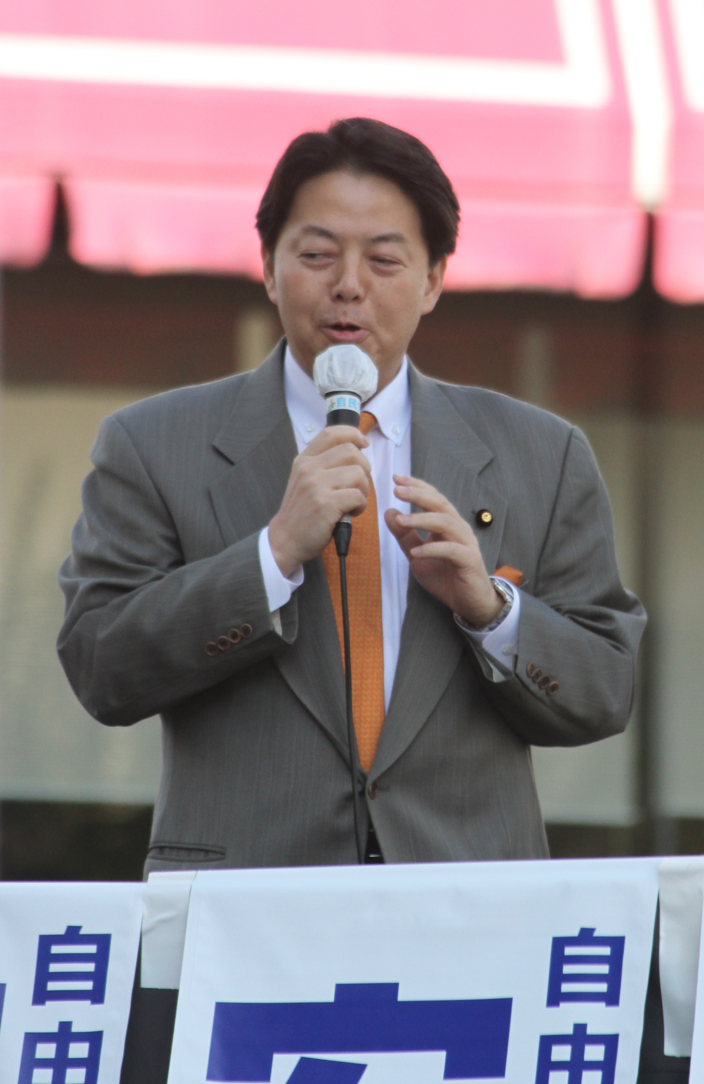 2012年自由民主党総裁選挙 街頭演説（林芳正）